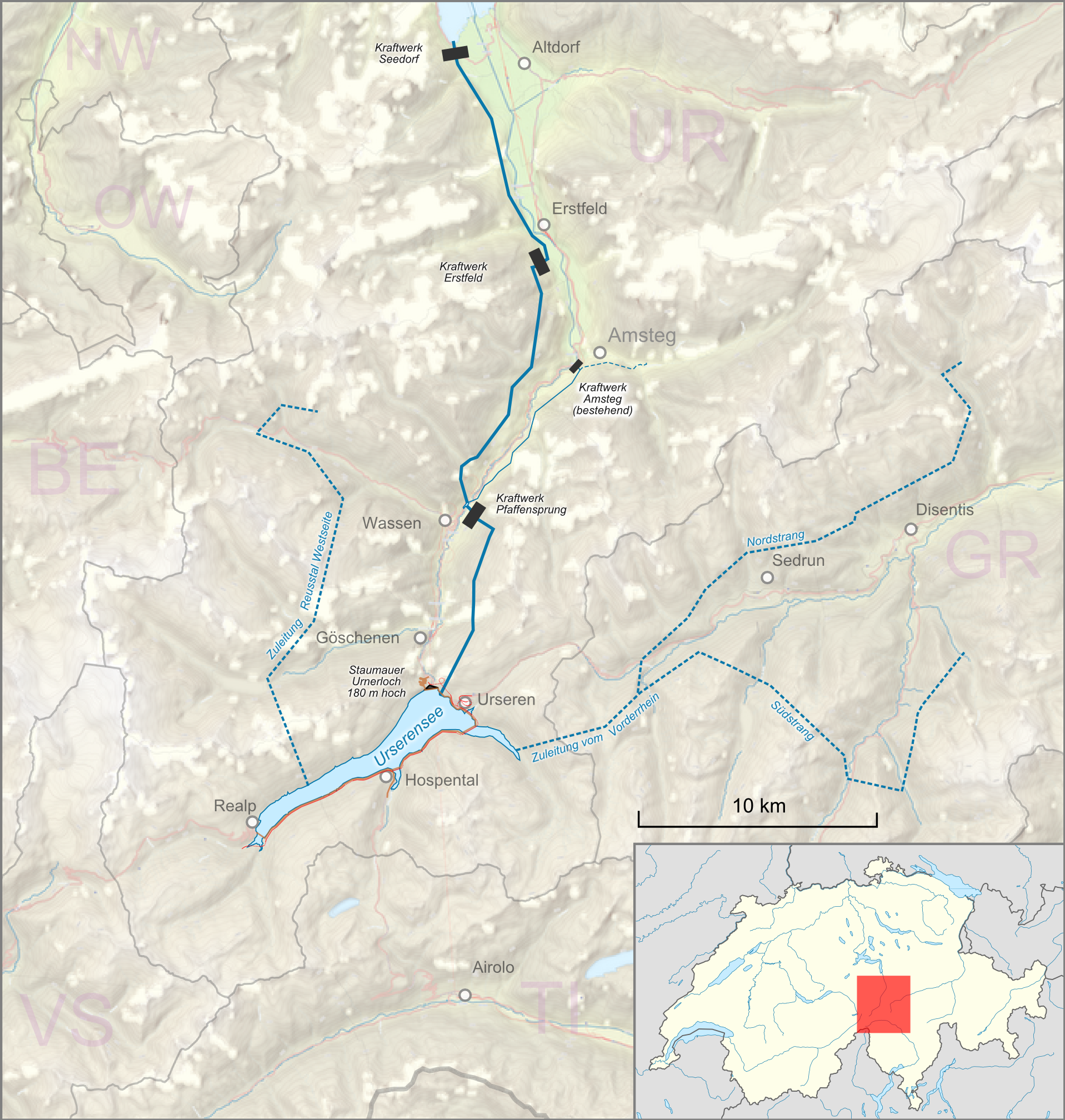 Lagekarte des Projektes eines Urserenkraftwerks im Jahre 1941.